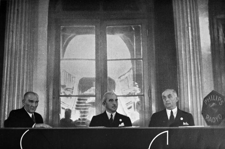 Mustafa Kemal Atatürk, İsmet İnönü, and Celâl Bayar during one of radio program.